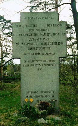 Minnesstenen över de döda i kolera i Baskemölla.